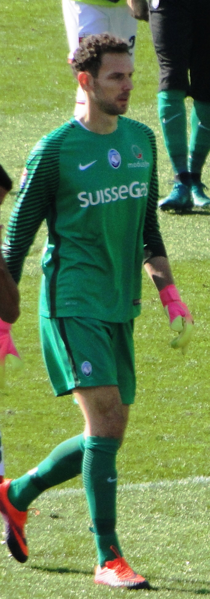 Etrit Berisha, calciatore albanese